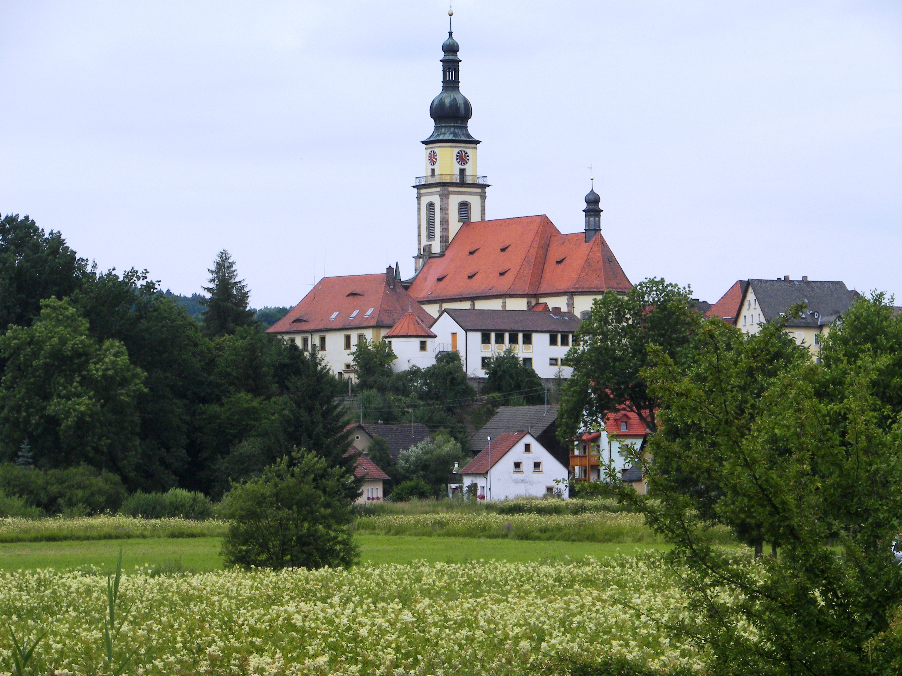 Kirche von Stadtsteinach, vom Freibad aus gesehen